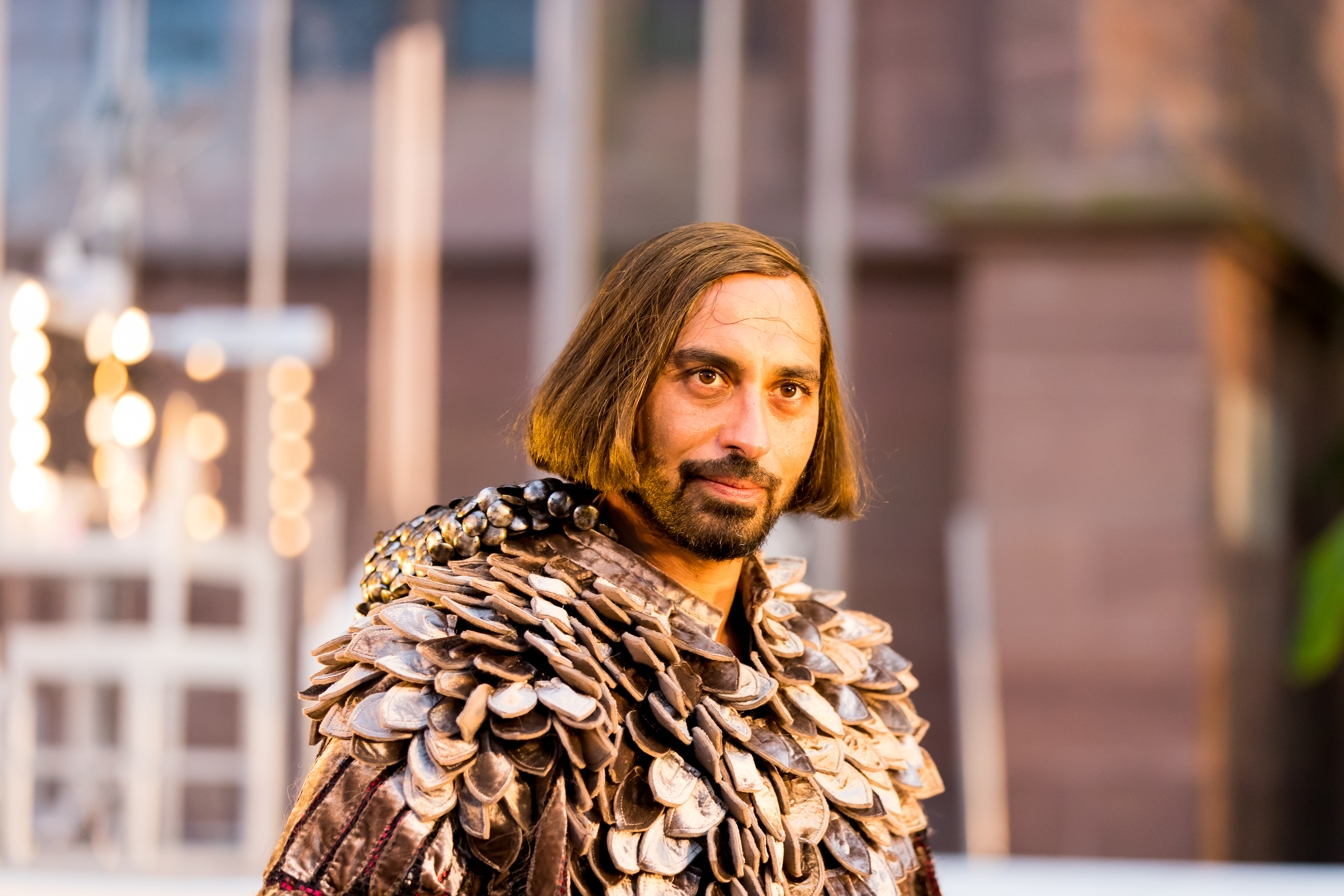 2016: Uraufführung: "GOLD. Der Film der Nibelungen" Regie: Nuran David Calis Autor: Albert Ostermaier Intendant: Nico Hofmann --- Ensemble: Produzent Konstantin Trauer: Uwe Ochsenknecht Regisseur Arsenij Kubik: Vladimir Burlakov Drehbuchautor Charlie P. Weide: Josef Ostendorf Society Reporter Peter Scheumer: Dominic Raacke Kamerafrau "the eye": Anna Rot Setdesignerin "set": Joy Maria Bai Assistentin des Produzenten Carmen: Alexandra Kamp Maskenbildnerin Sueyla Blume : Ayse Bosse die Ältere Kriemhild Karina Bergmann: Katja Weitzenböck die Jüngere Kriemhild Simone Gehel: Constanze Wächter die Ältere Brünhild Lotte Jünger: Michaela Steiger die Jüngere Brünhild Nathalie Aurun: Dennenesch Zoudé Siegfried Mohamad Söder: Ismail Deniz Hagen René Inner: Sascha Göpel Gunther Klaus Castel: Maximilian Laprell Bürgermeister Franz Koppoler: Heiner Lauterbach during Nibelungenfestspiele "GOLD. Der Film der Nibelungen" at Wormser Kaiserdom, Worms, Rheinland Pfalz, Germany on 2016-07-12, Photo: Sven Mandel